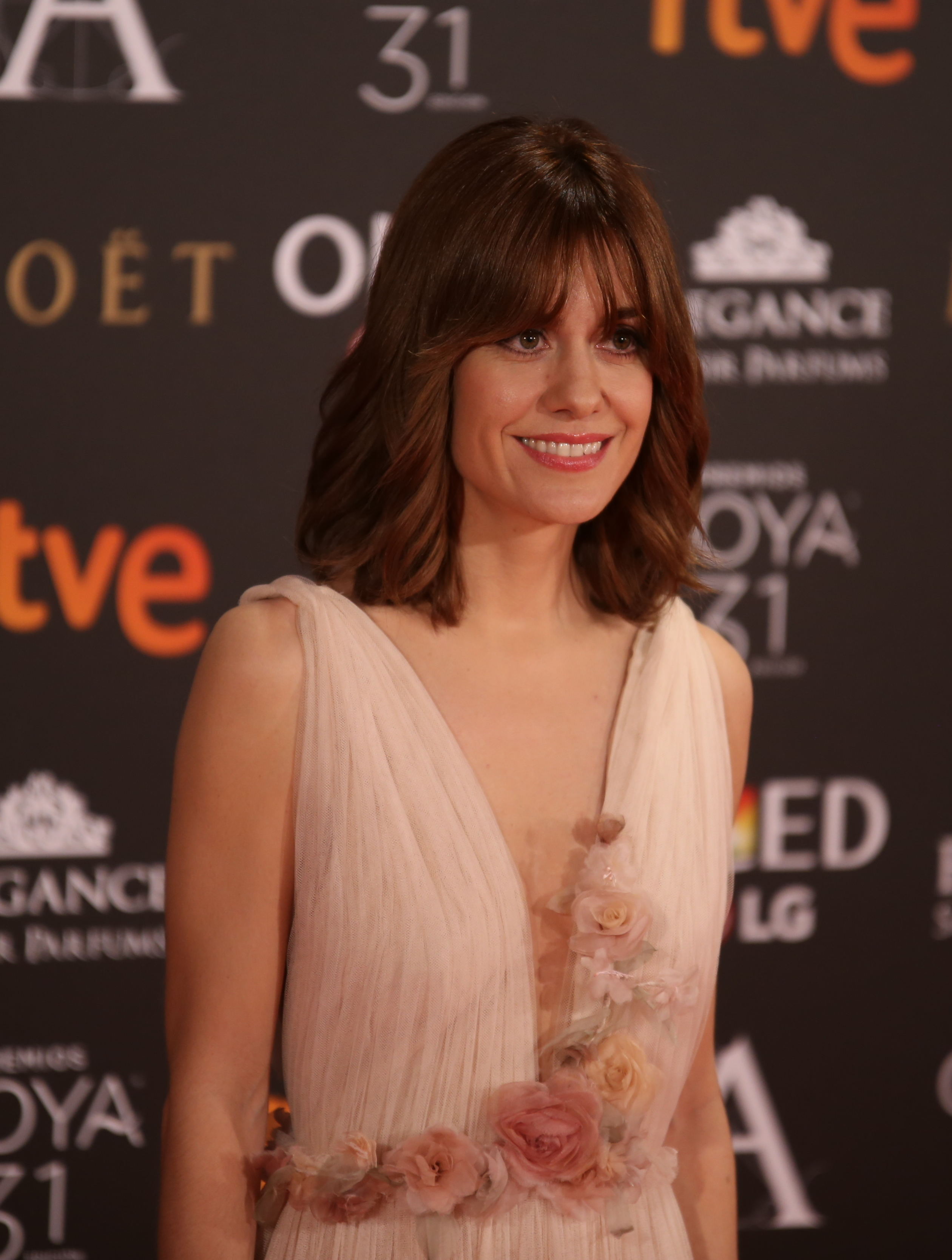 Premios Goya 2017